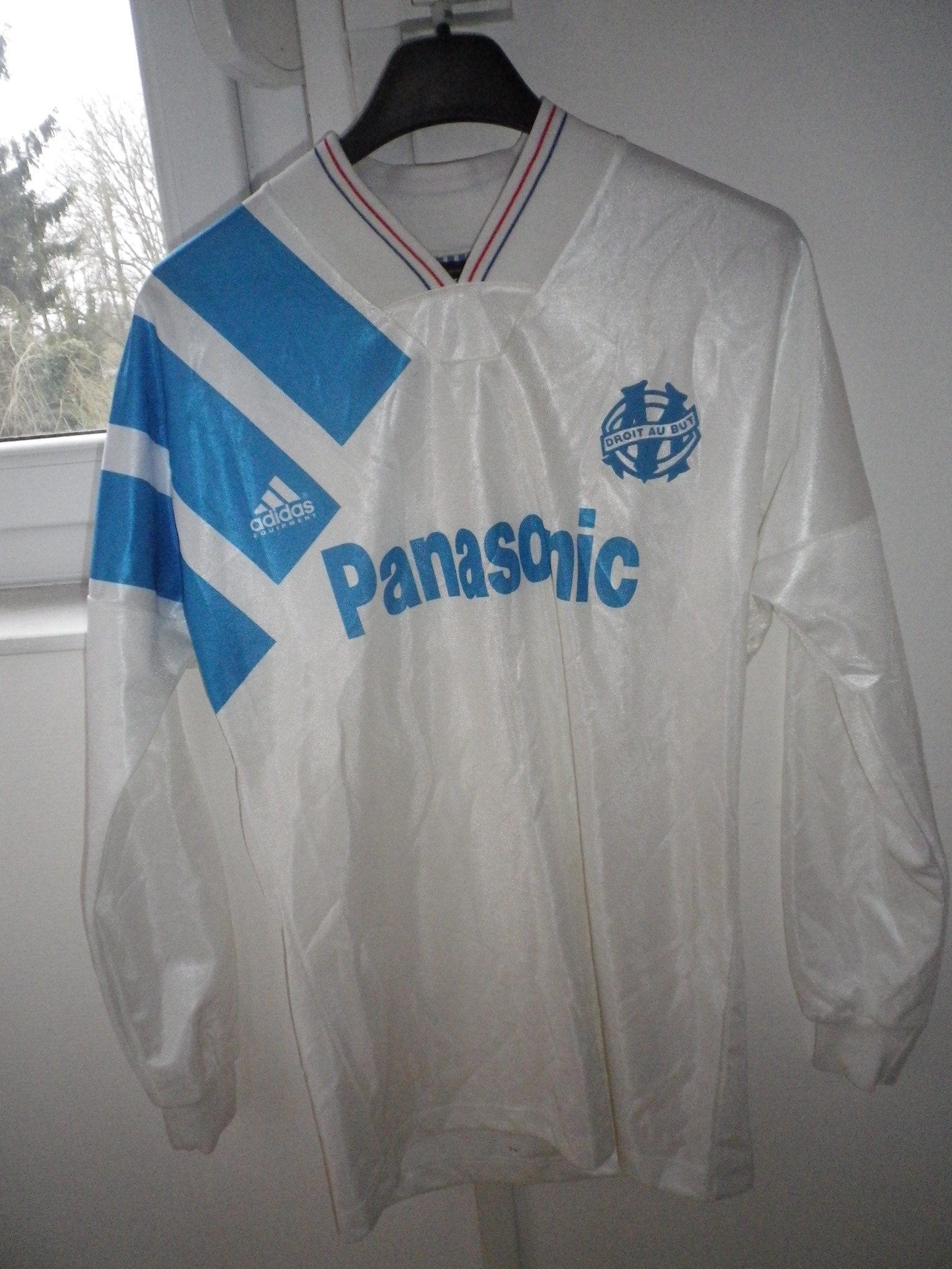 Camisòt de la sason 1991-1992 de l'OM Pentax Optio H90